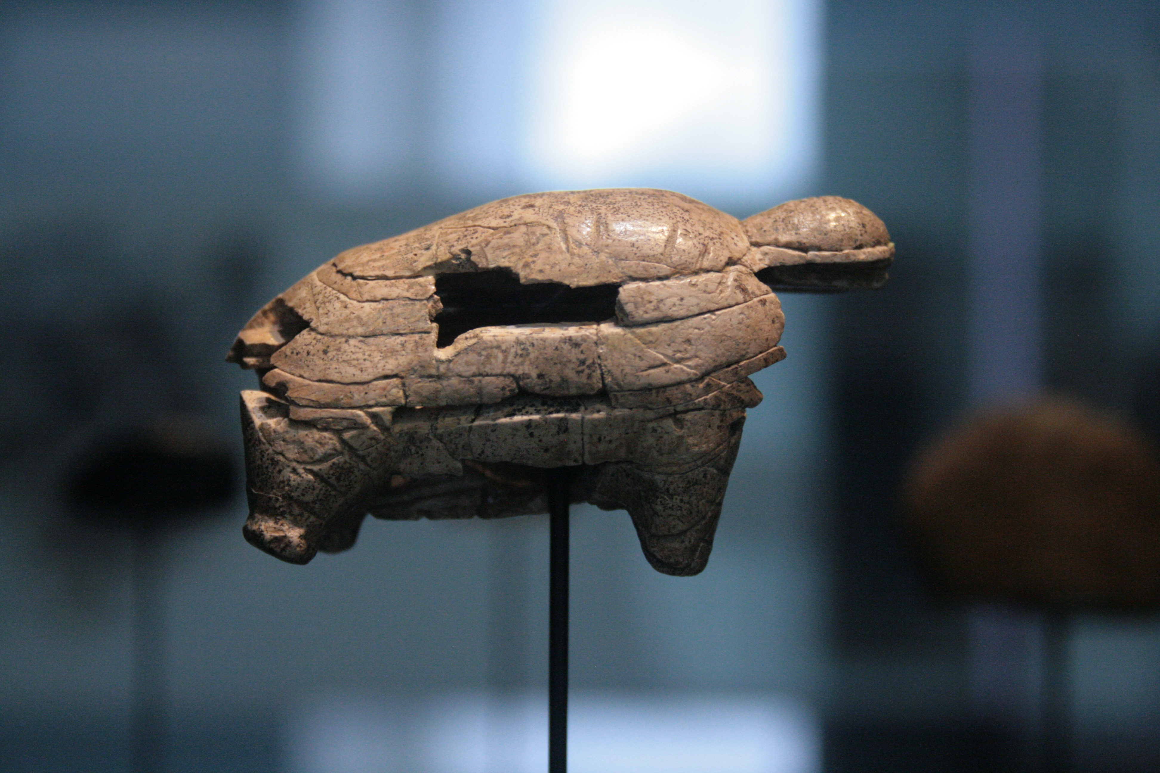 Mammut aus Elfenbein, ca. 35.000 - 40.000 Jahre alt. Landesmuseum Württemberg.